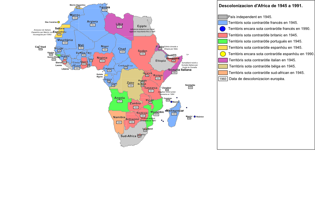 Descolonizacion d'Africa de 1945 e 1990.